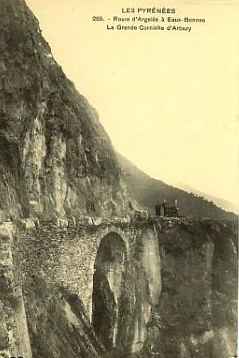 Route thermale des pyrénées- France